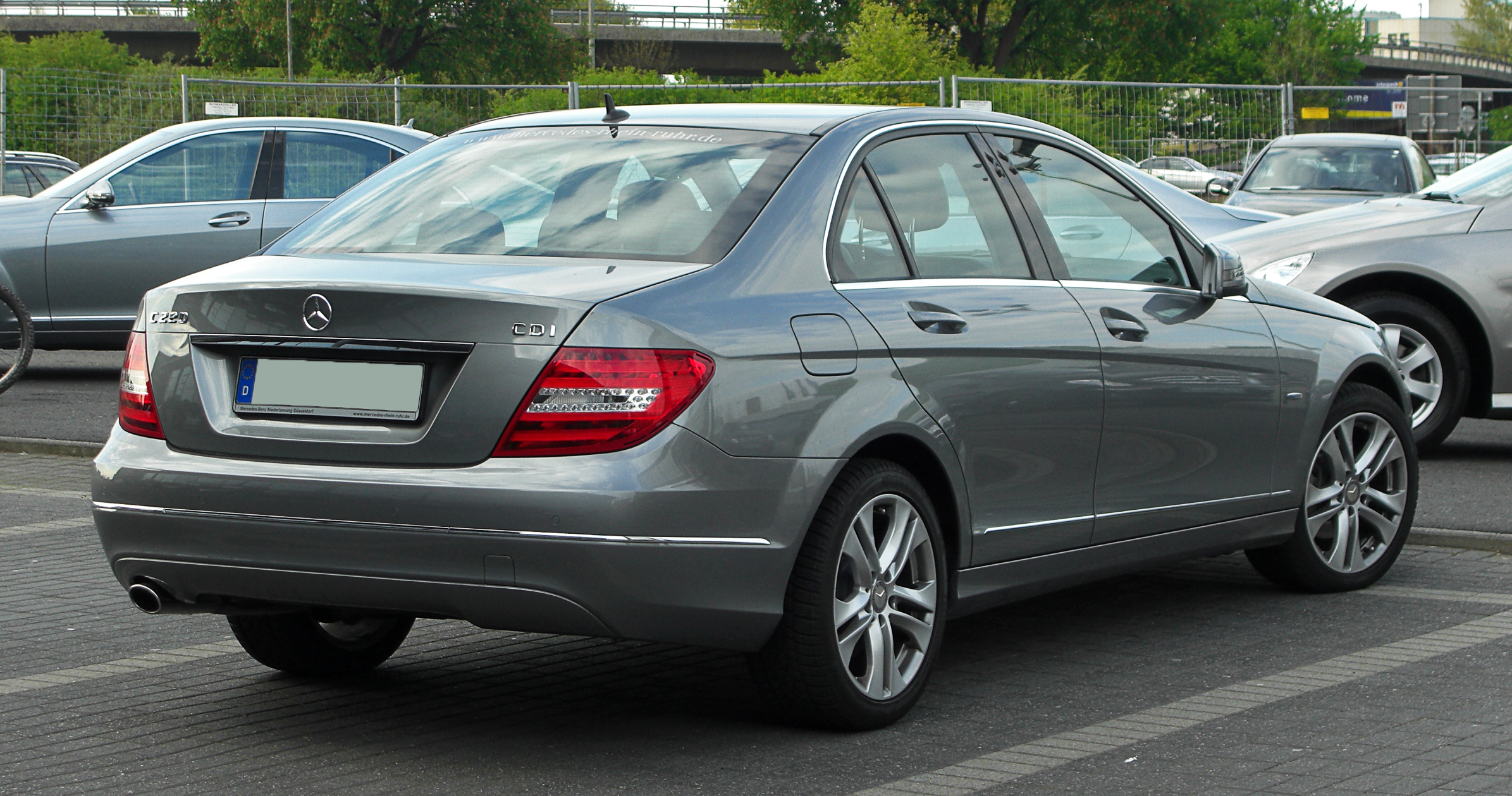 Mercedes-Benz C 220 CDI BlueEFFICIENCY Avantgarde (W 204, Facelift)